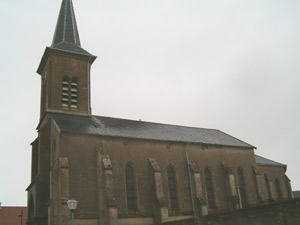 Église de Beuvillers Licensing Catégorie:Image de commune de Meurthe-et-Moselle